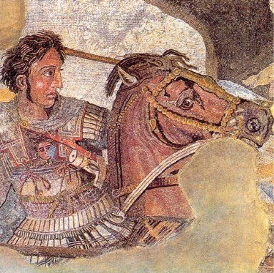 Alexandre Mosaïque, détail Auteur :Clio20